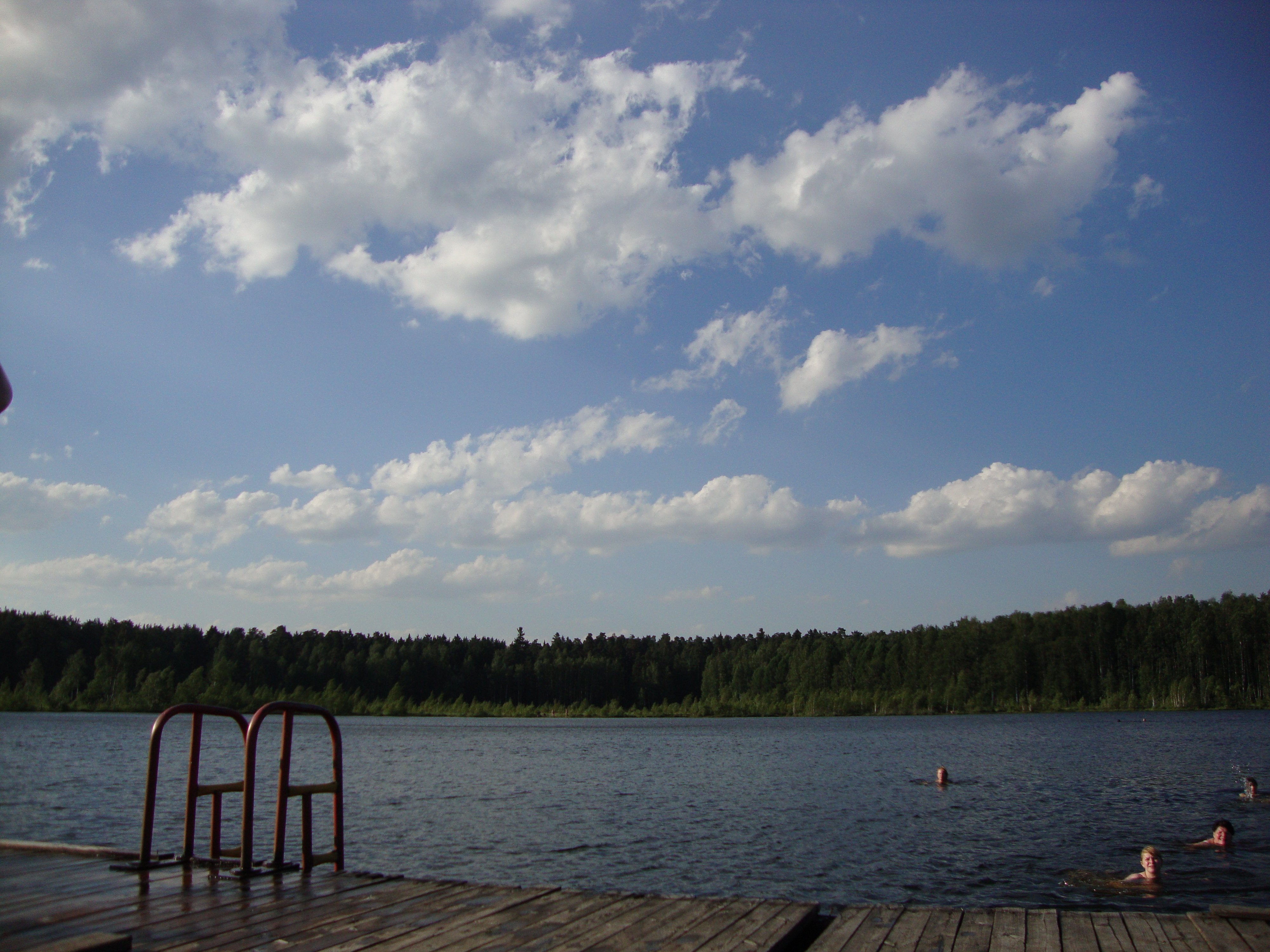 Бабошкино озеро, Московская область